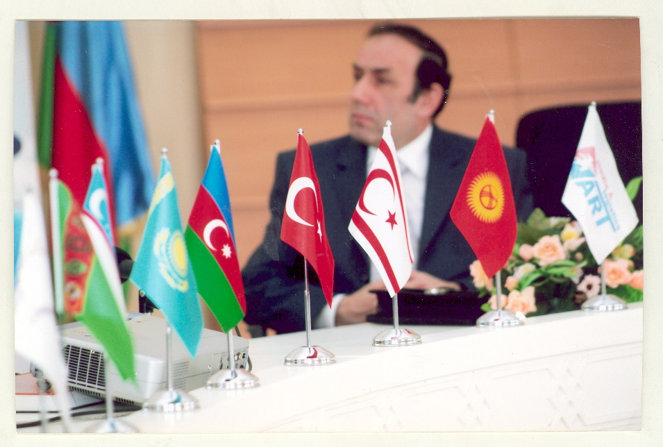 Konqresdə